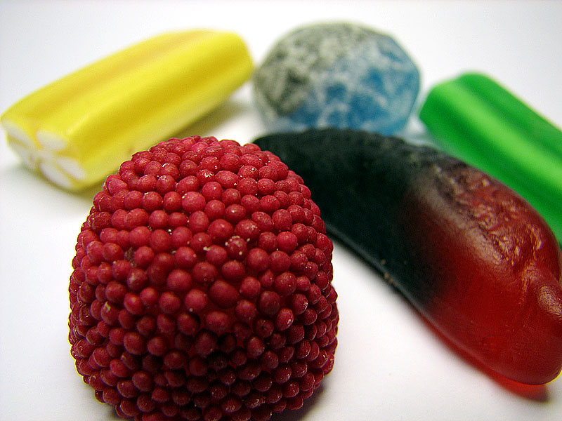 Lösgodis